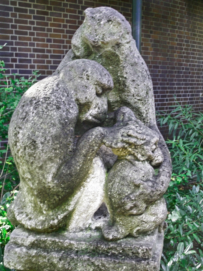 "Affengruppe" von Arminius Hasemann (1888 - 1979) entstanden nach 1922, 1979 dem Berliner Zoo geschenkt - Sandstein. Die Skulptur befindet sich an der Nordseite des Affenhauses.